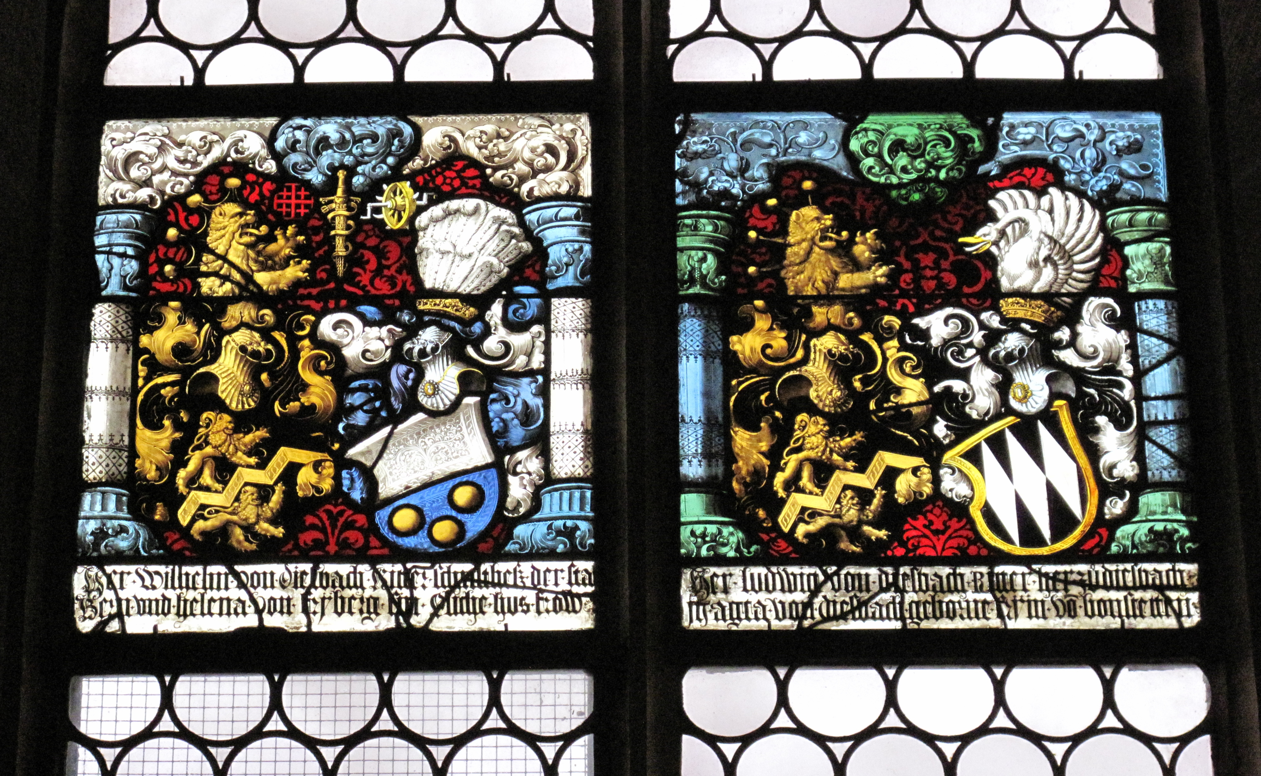 Kirche Ligerz, Allianzscheiben Wilhelm von Diesbach und Helena von Freyberg und Ludwig von Diesbach und Agatha von Bonstetten.